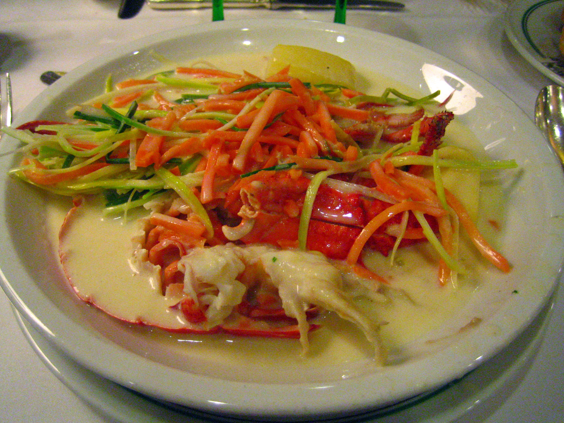 waterzooi???????, at restaurant Aux Armes de Bruxelles